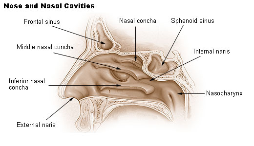 Illu nose nasal cavities